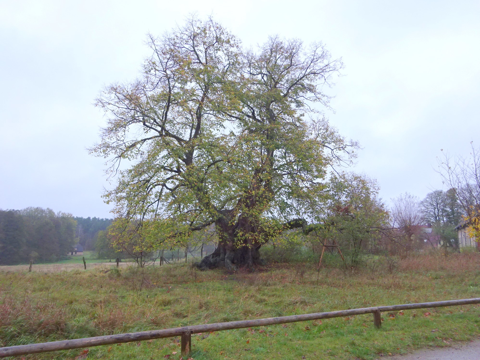 Dorflinde in Speck (17192 Kargow)